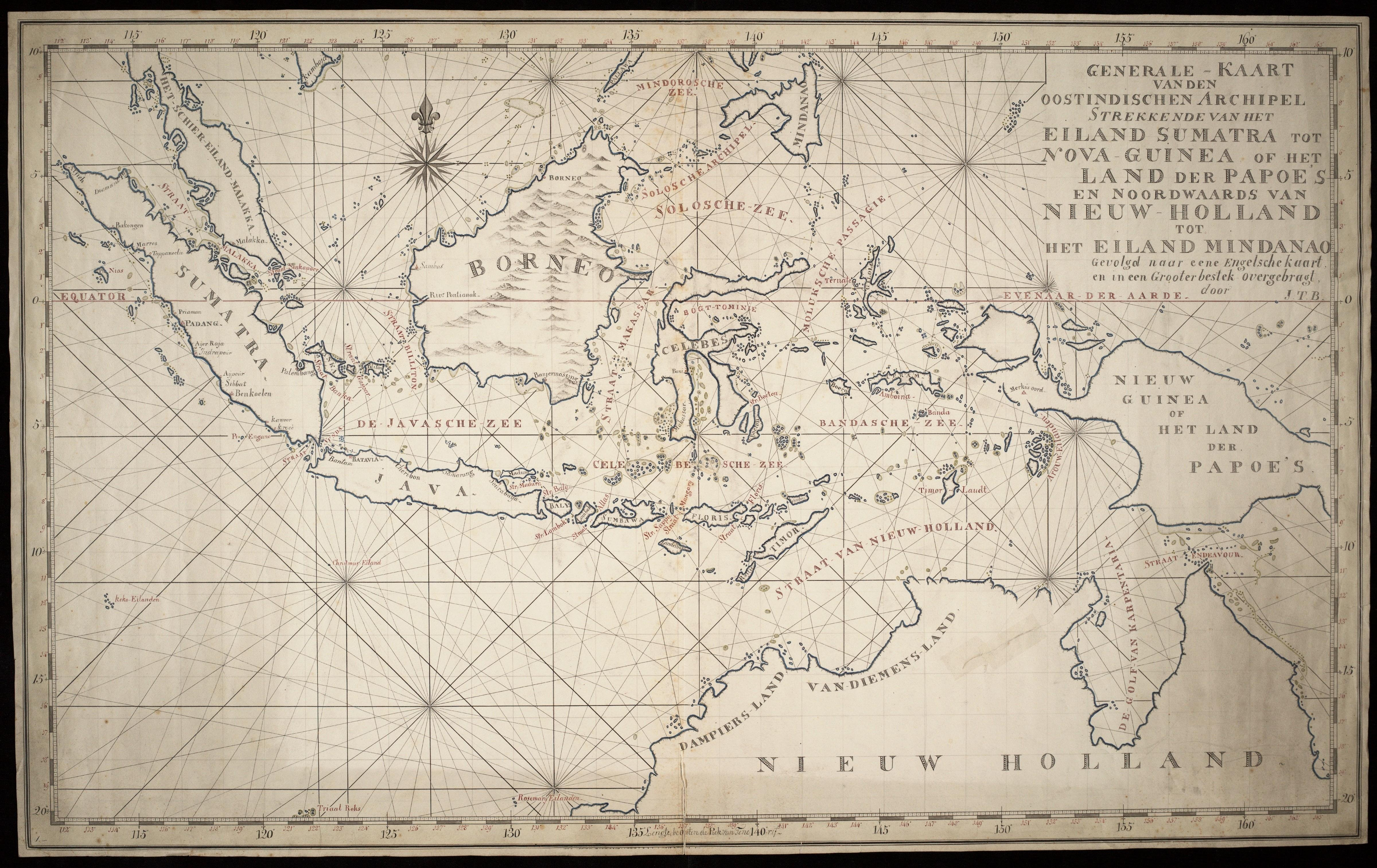 Getekende kaart van de Oost-Indische Archipel, strekkende van het eiland Sumatra tot Nieuw-Guinea of het land der Papoes, en noordwaarts van Nieuw-Holland tot het eiland Mindanao.